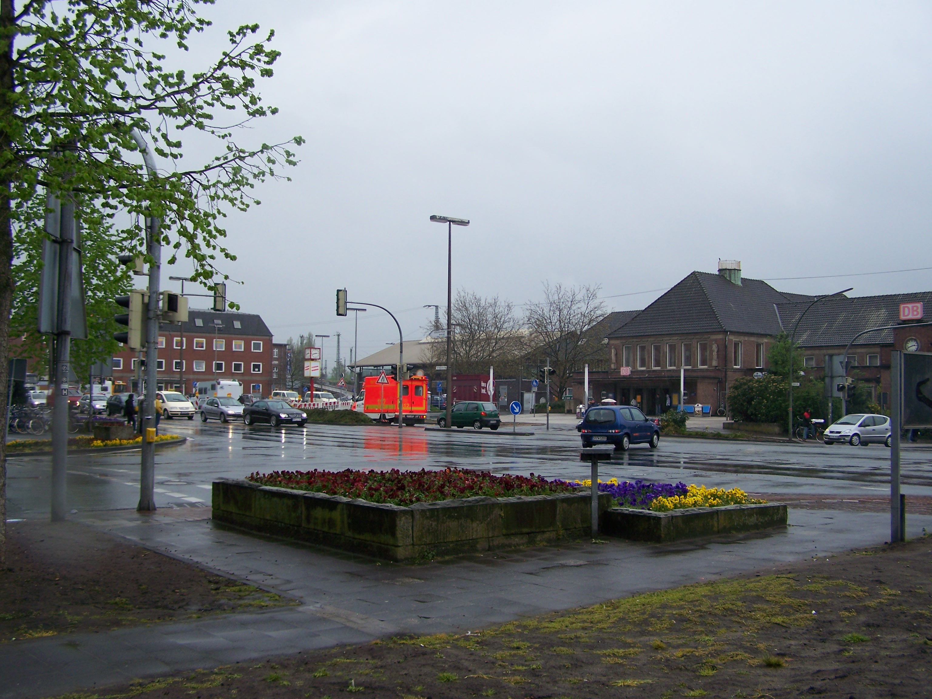 Vorplatz am Bahnhof Rheine, Rheine an der Ems, Kreis Steinfurt, Nordrhein-Westfalen, Deutschland.